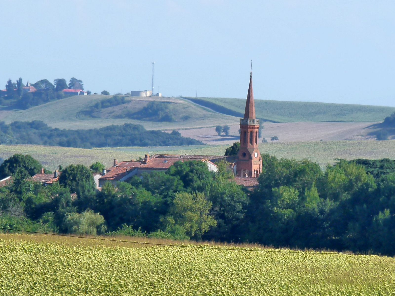 Auragne vue de l'est, Haute-Garonne, France